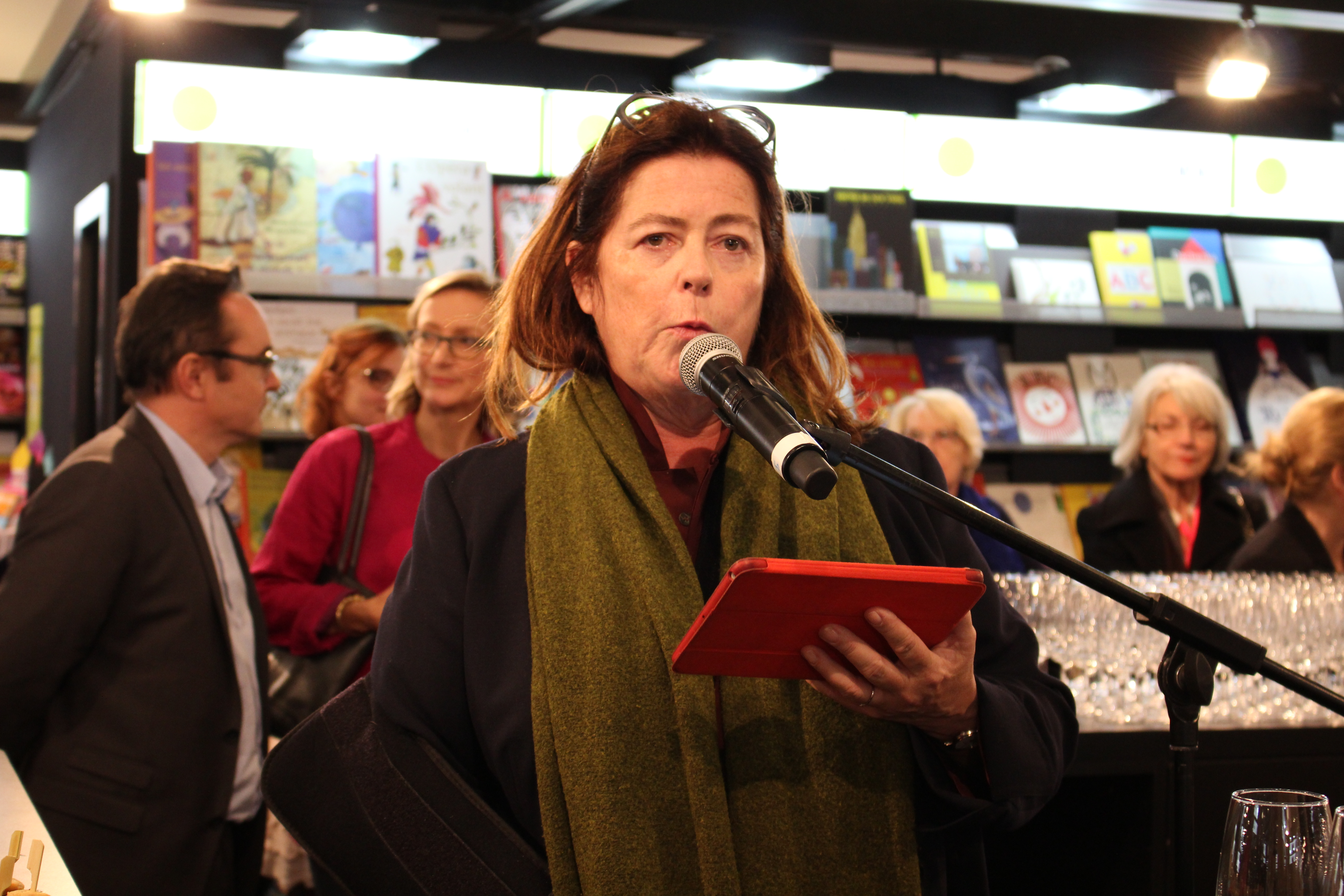 Vera Michalski (BIEF) - Frankfurt Buchmesse 2015